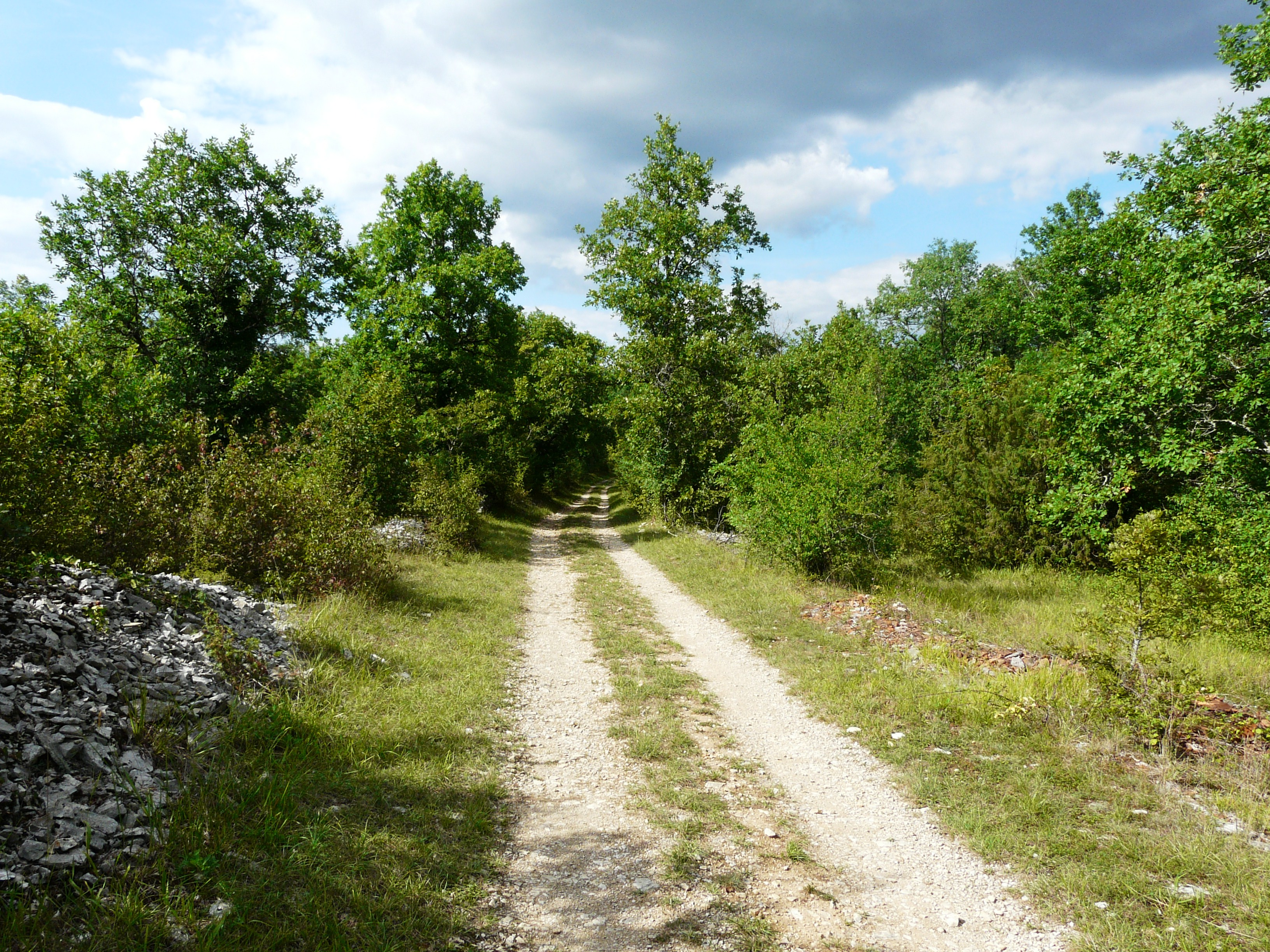 Le sentier de grande randonnée GR 646 sur le causse de Cubjac, au nord de Petit Grand Champ, Sainte-Eulalie-d'Ans, Dordogne, France.